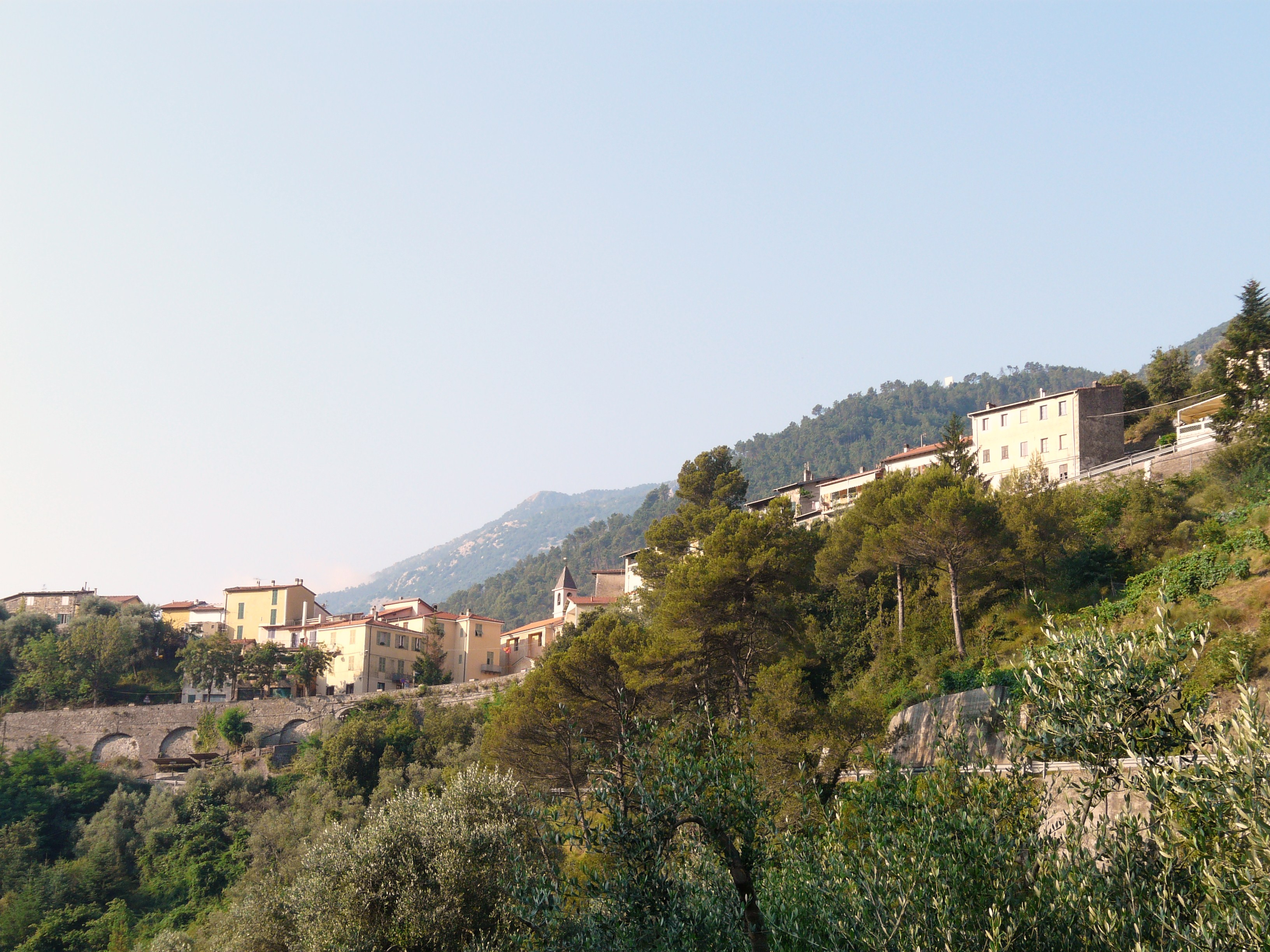 Panorama di Olivetta San Michele, Liguria, Italia